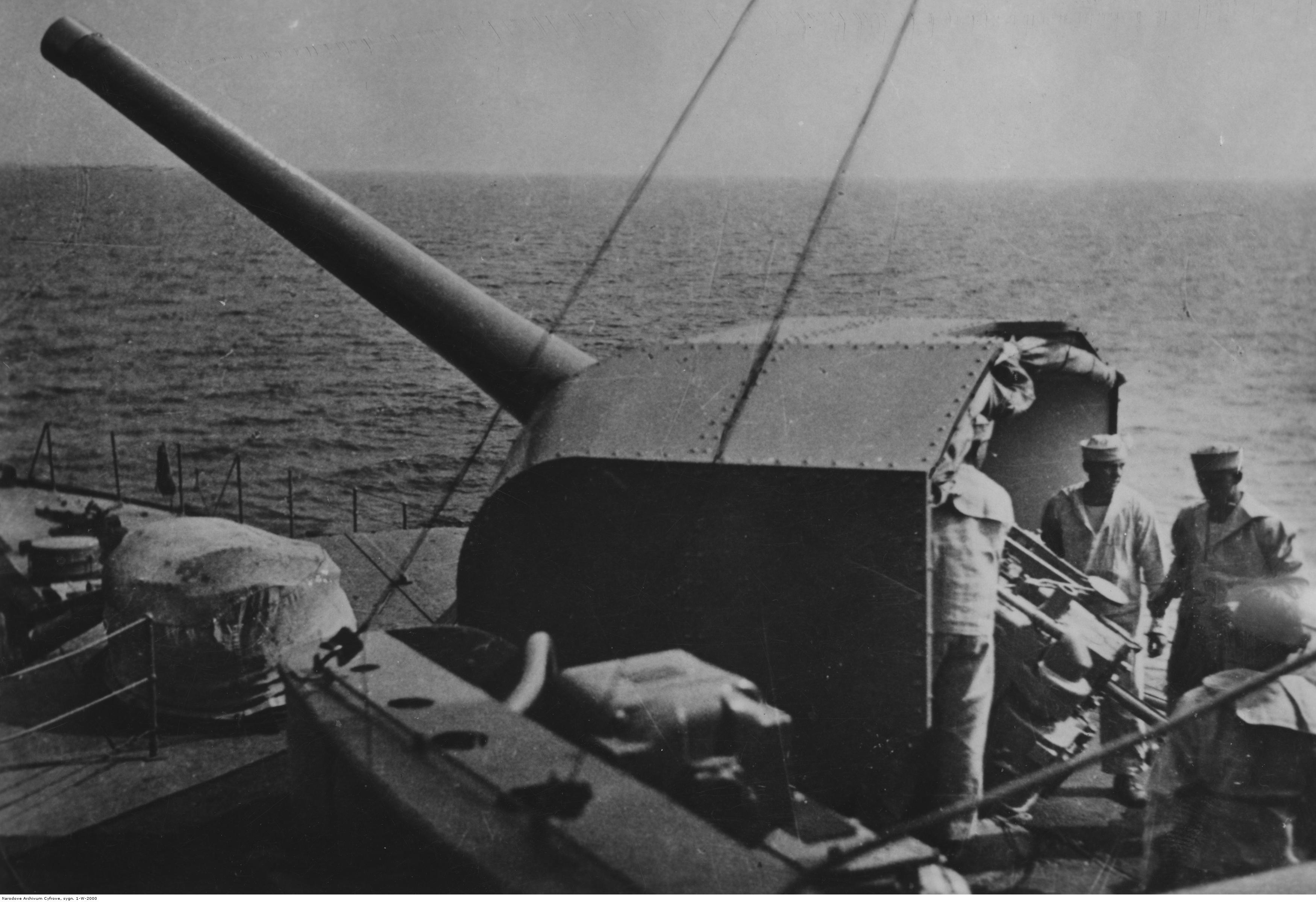 Ćwiczenia artyleryjskie na niszczycielu ORP "Burza". Marynarze przy armacie morskiej Schneider-Creusot wz. 1924 kal. 130 mm.